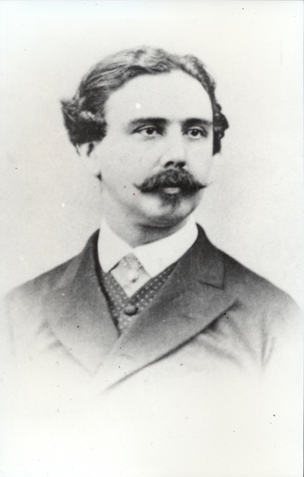 Claudio Gil y Serra, empresario español, (1827)